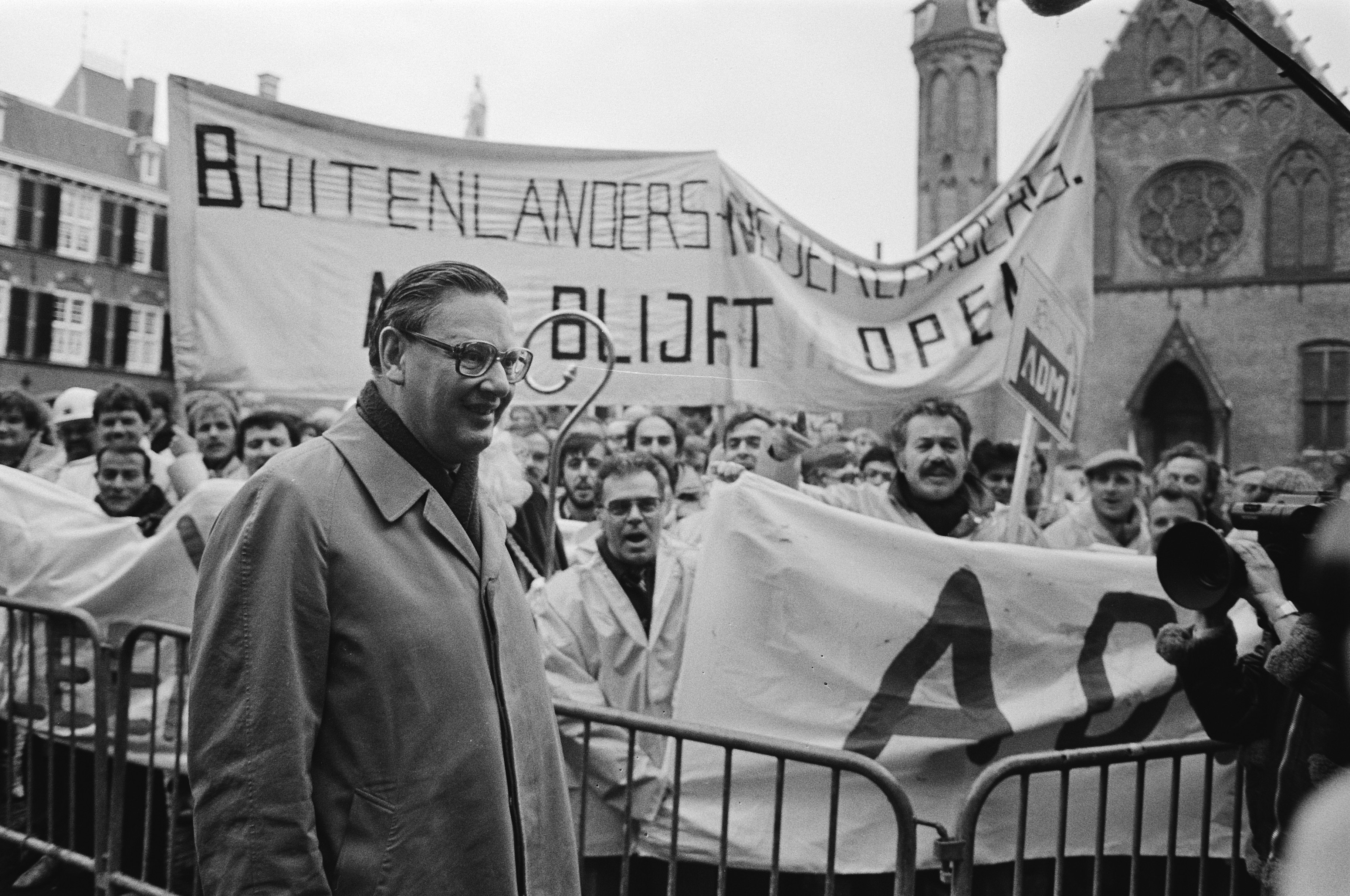 Collectie / Archief : Fotocollectie Anefo Reportage / Serie : Debat over de ADM in de Tweede Kamer Beschrijving : ADM-medewerkers met spandoeken op het Binnenhof; Minister van Economische Zaken, Gijs van Aardenne loopt langs Datum : 8 december 1982 Locatie : Den Haag, Zuid-Holland Trefwoorden : bedrijfssluitingen, betogingen, ministers, spandoeken, werknemers Persoonsnaam : Aardenne, G.M.V. van Instellingsnaam : ADM Fotograaf : Croes, Rob C. / Anefo Auteursrechthebbende : Nationaal Archief Materiaalsoort : Negatief (zwart/wit) Nummer archiefinventaris : bekijk toegang 2.24.01.05 Bestanddeelnummer : 932-4321